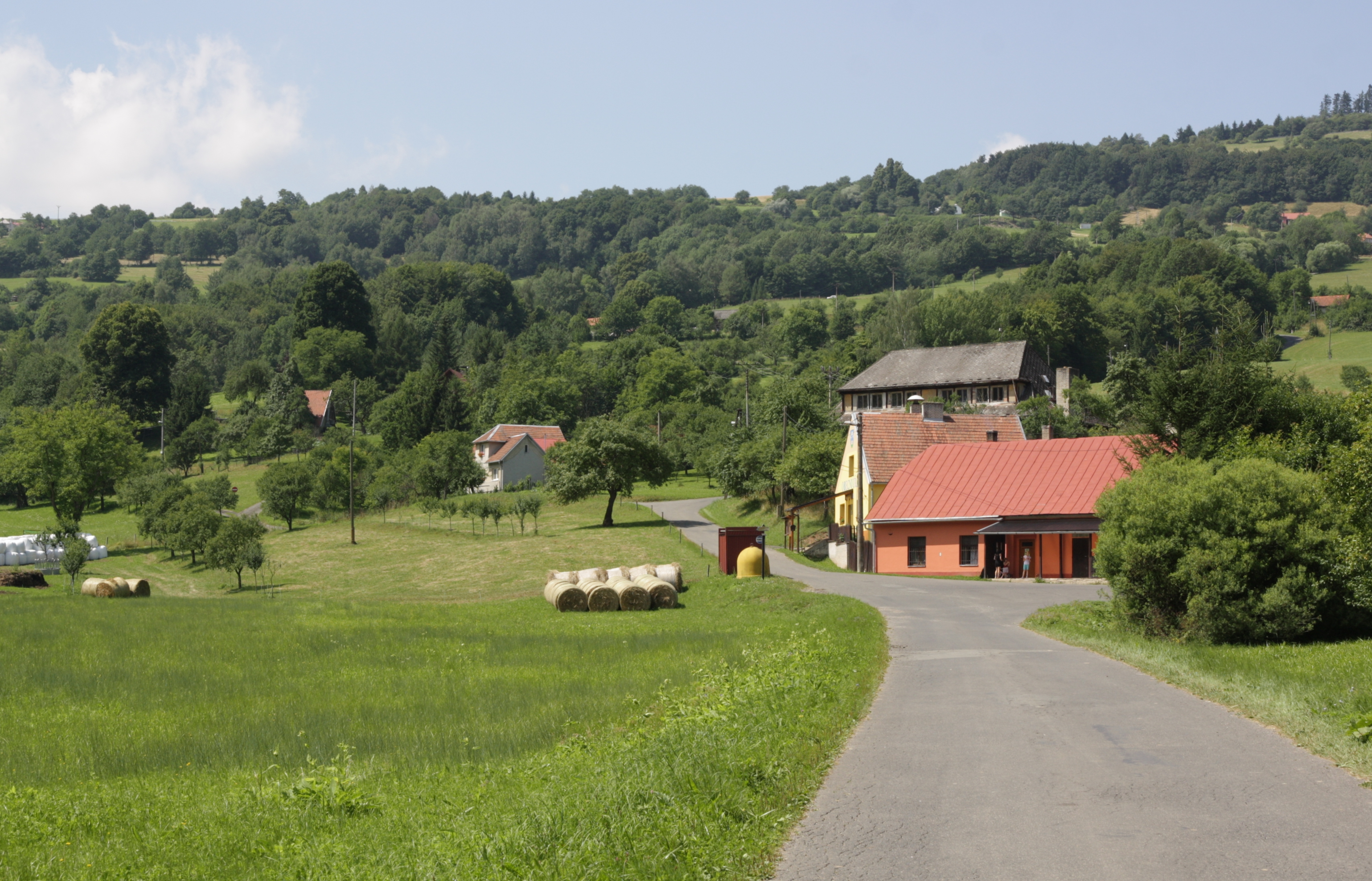 Vyškovec - náves u obecního úřadu